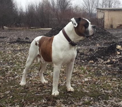 Американский бульдог смешанного типа Гавриил. Высота в холке 63 см, вес 54 кг.